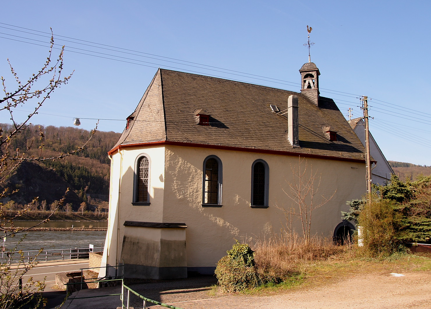 Katholische Pfarrkirche St. Sebastian in St. Goarshausen-Ehrenthal, Rhein-Lahn-Kreis, Rheinland-Pfalz Erbaut 1705-1708 nach Plänen des Hofarchitekten Philipp Honorius Ravensteyn.